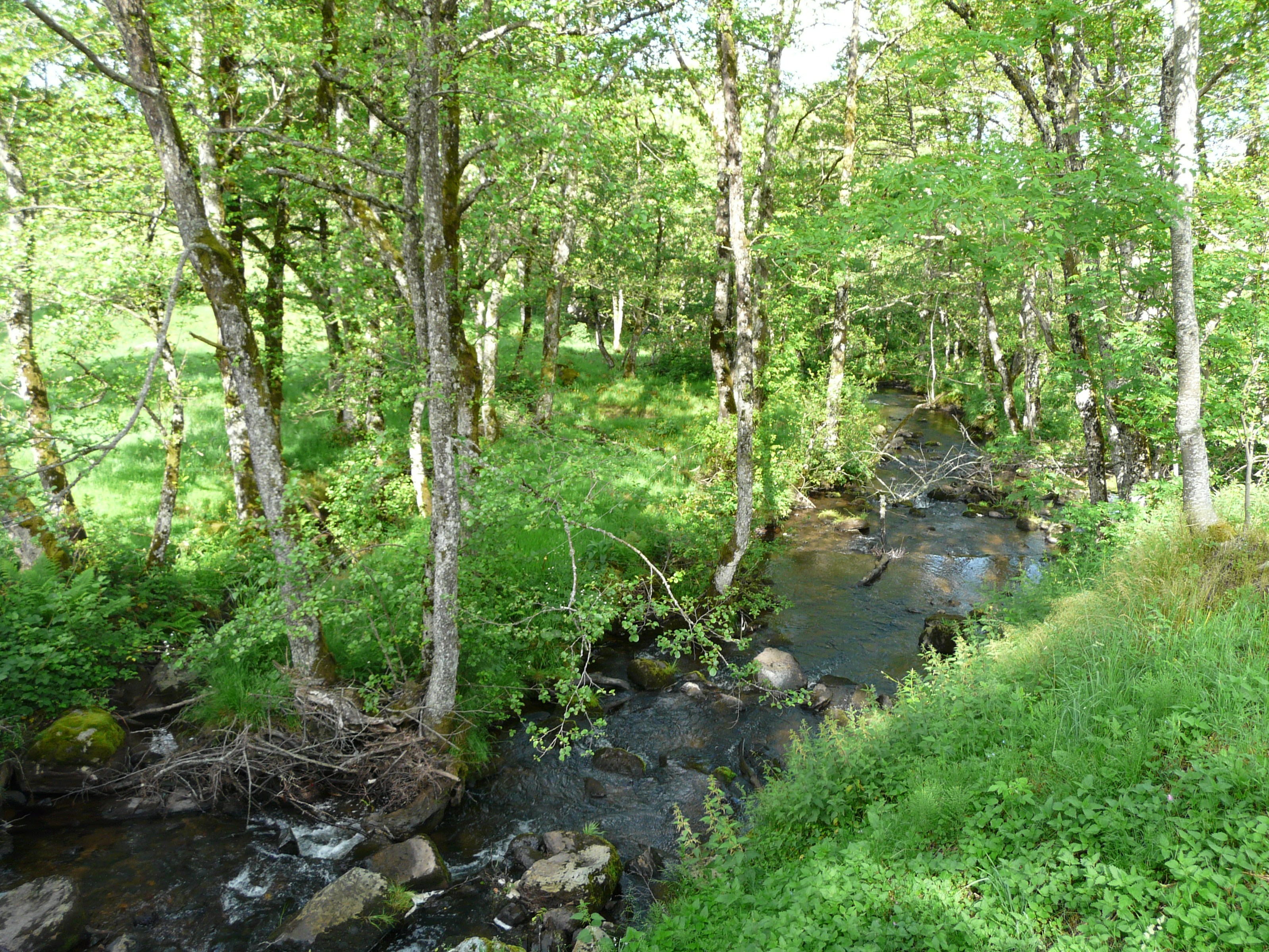 La Gagne en aval du pont de la route départementale 88, Chastreix, Puy-de-Dôme, France.